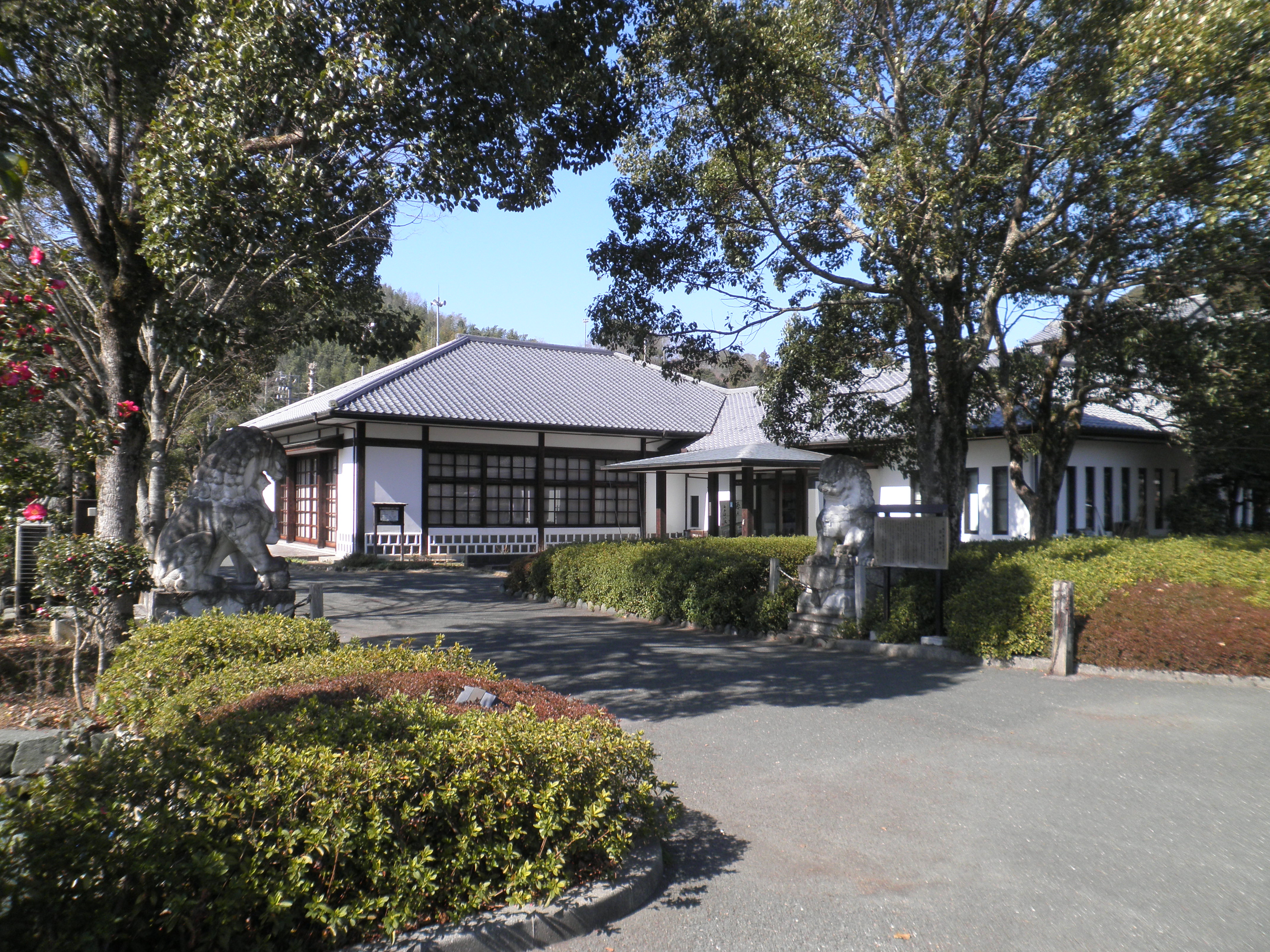 愛媛県喜多郡内子町の五十崎地区にある五十崎凧博物館